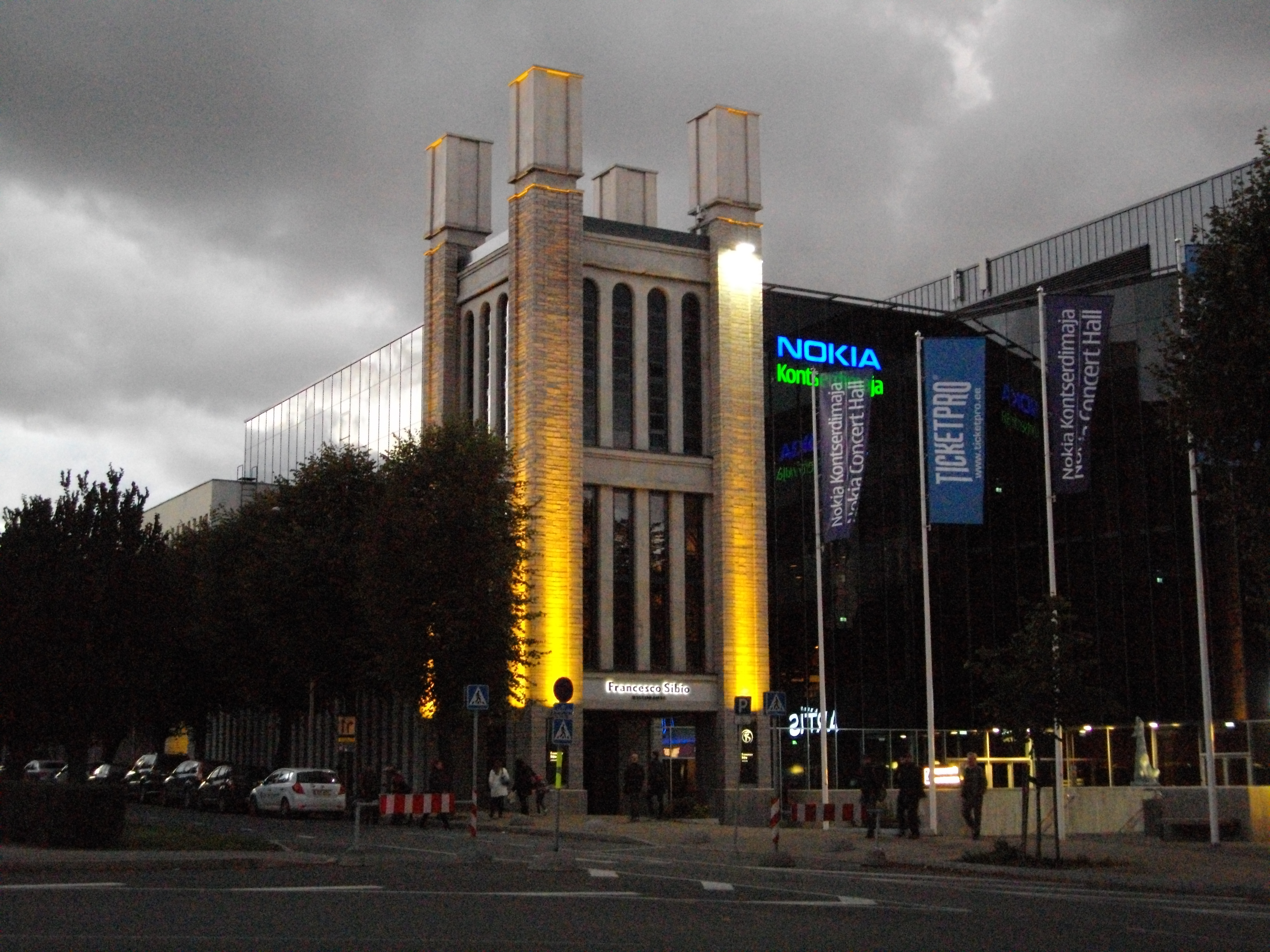 Sakala keskuse torn 2011 aastal